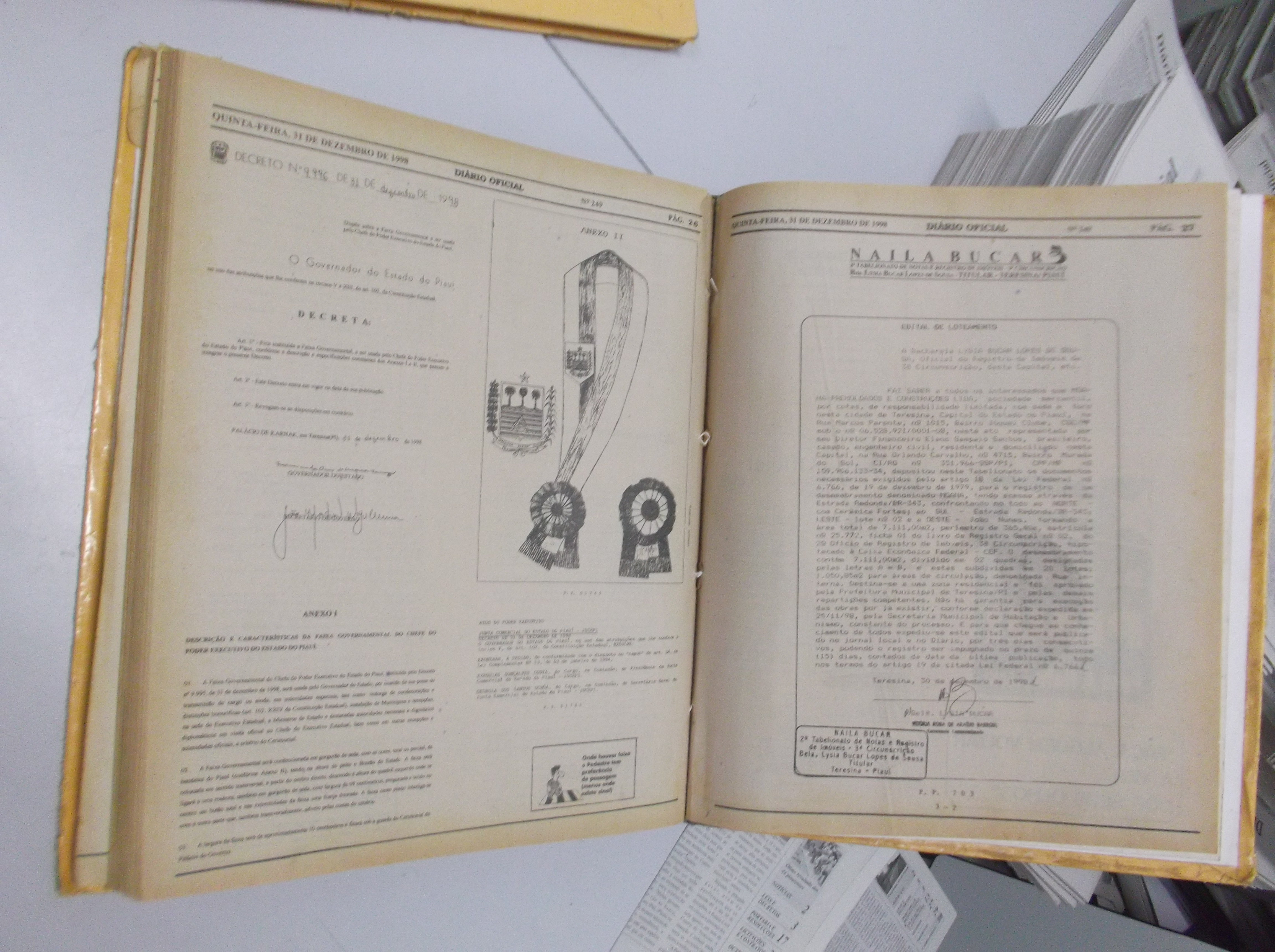 Encadernado de edições antigas do diário oficial do estado do Piauí. Este mostra o decreto em que foi criado a Faixa Governamental do Piauí ou Faixa de Governador do Piauí.